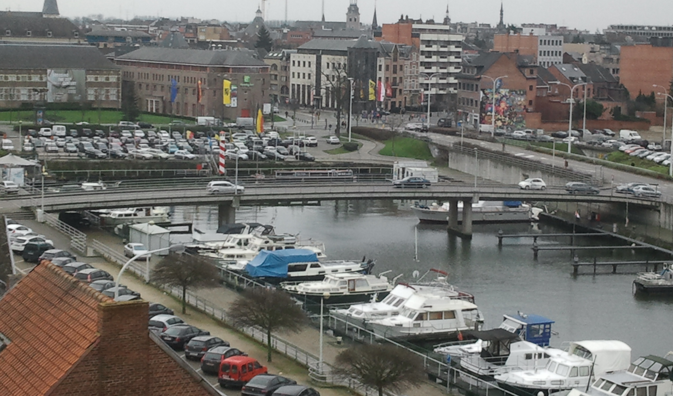 Kanaalkom te Hasselt, België. Foto genomen vanaf appartementencomplex 'De Kaai'.